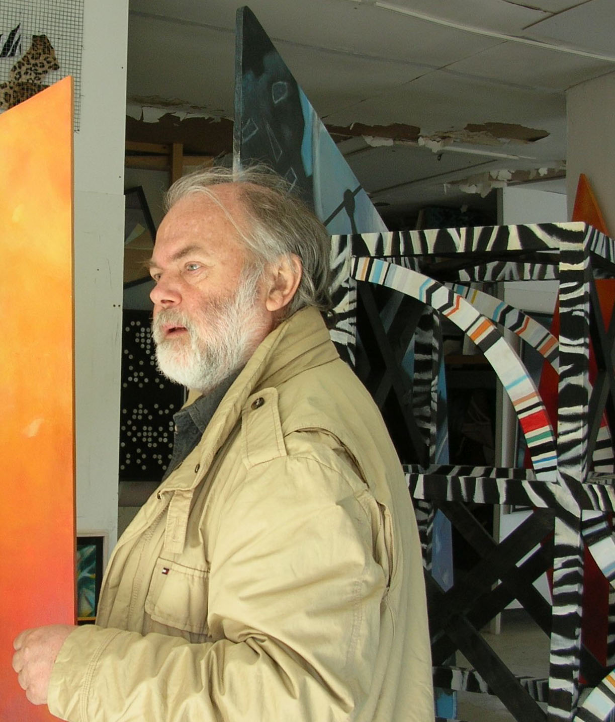 portrait im Atelier